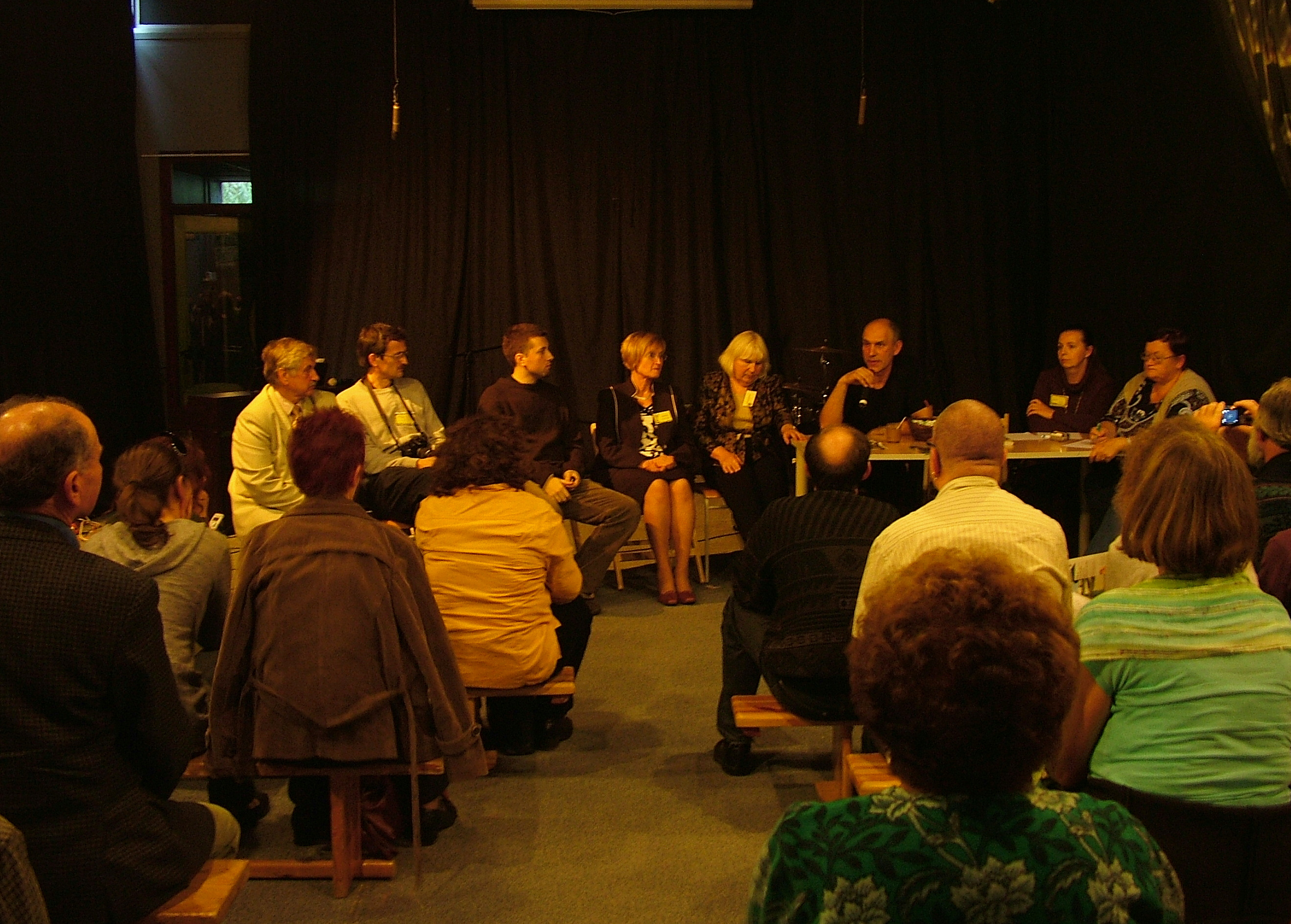 Kunveno dum Arkones 2008, Poznano